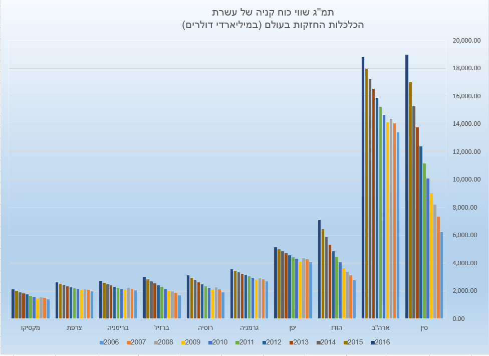 גרף של עשרת הכלכלות החזקות בעולם בעשור האחרון מבוסס על קרן המטבע הבינלאומית